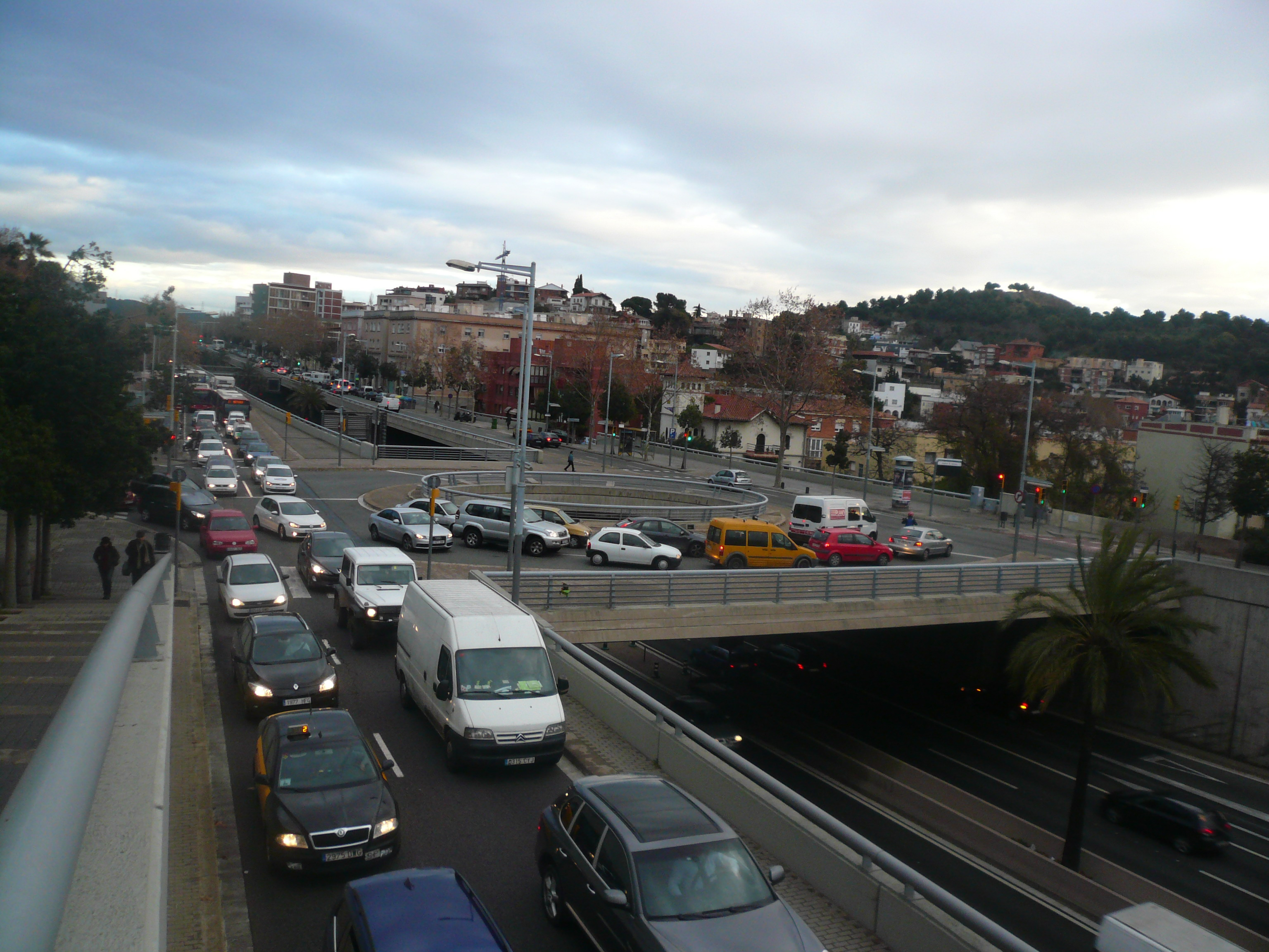 El passeig de la Vall d'Hebron als Penitents, vist des de la cantonada amb el carrer Ticià.